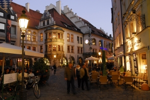 Platzl mit Blick aufs Hofbräuhaus am Abend